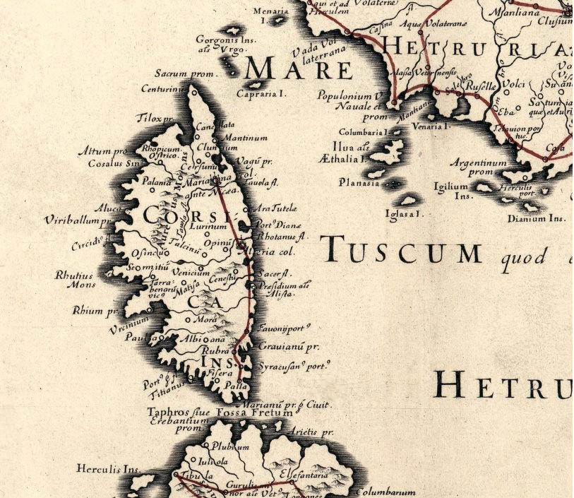 Carte de Corse extraite de L'Italie suivant les itinéraires romains par Nicolas Sanson (1600-1667), cartographe et Melchior Tavernier (1594-1665), graveur